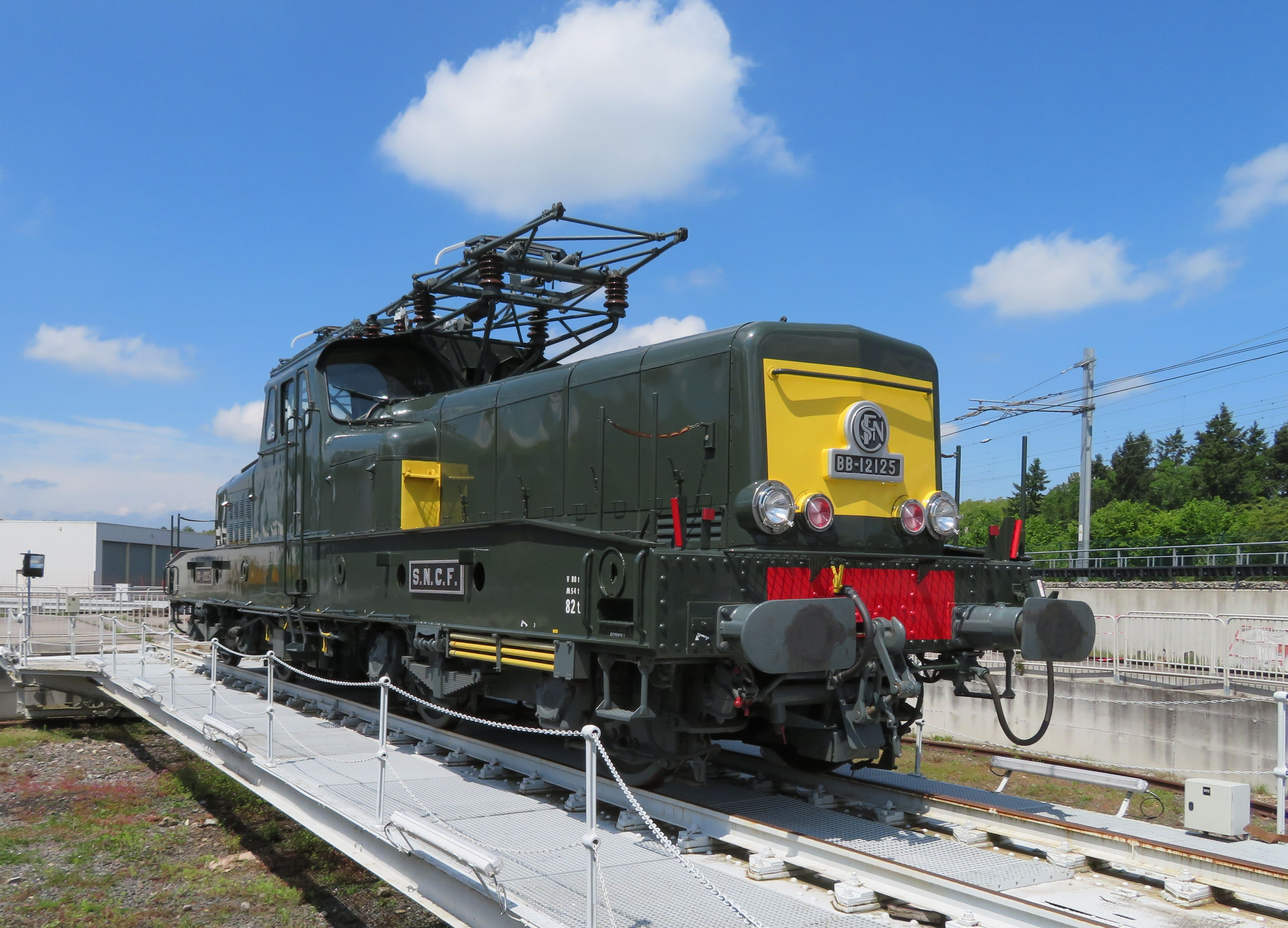 Mulhouse, Eisenbahnmuseum 2016